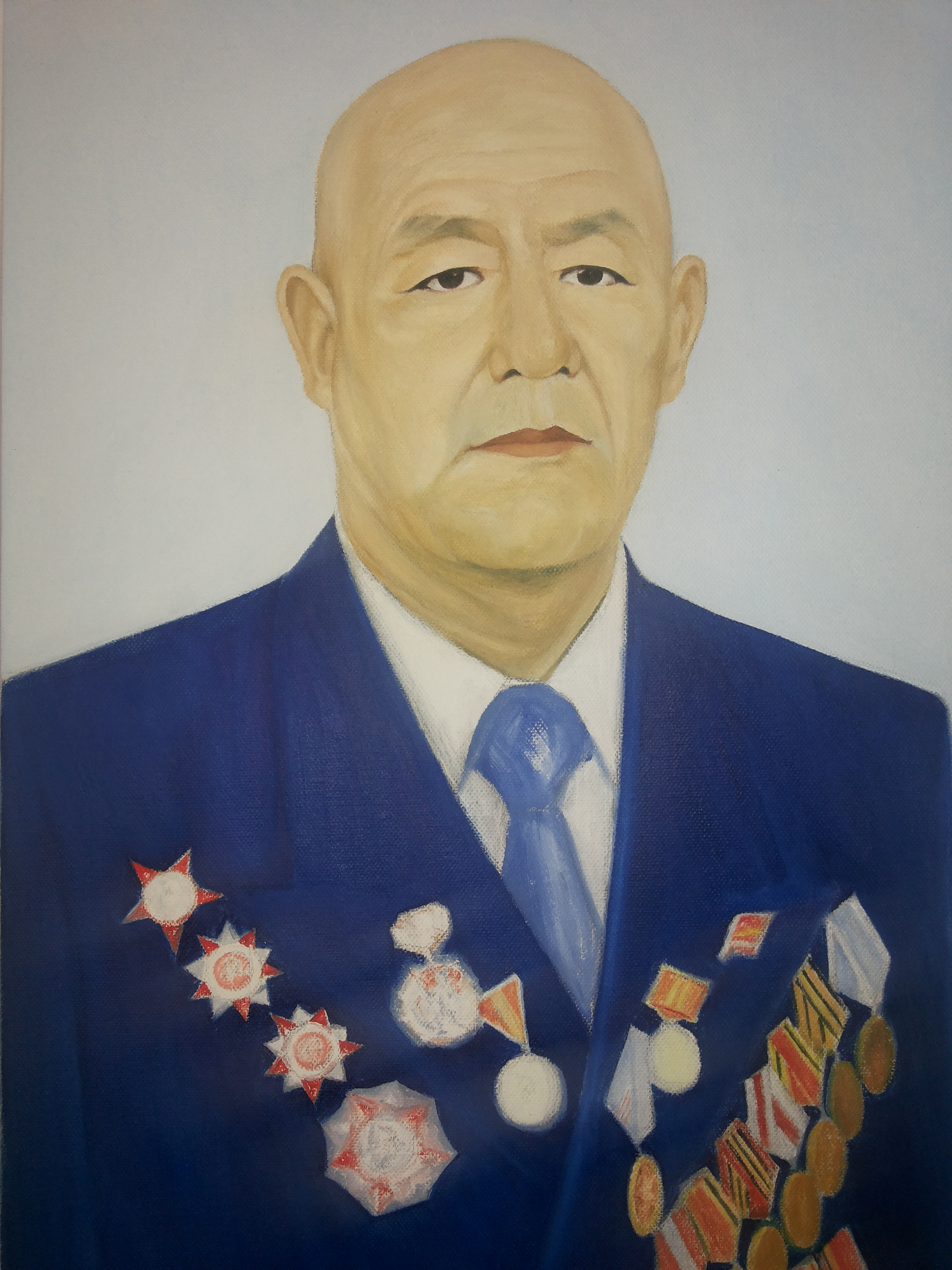 Меним атам Самбет Саттаров, портрет авторы Саттаров Абдыгапбар Самбетович.